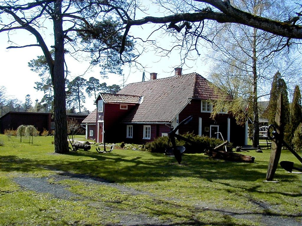 Ainažu jūrskolas muzejs 2002-05-01